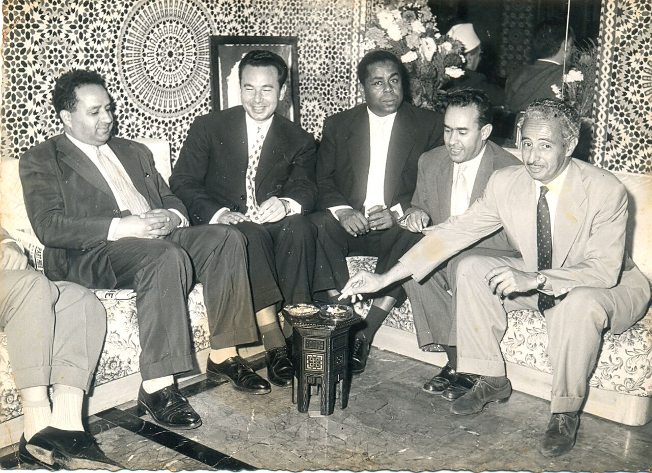 Ahmed Bendella & Mehdi Ben Barka lors d'une fête privée après l'indépendance